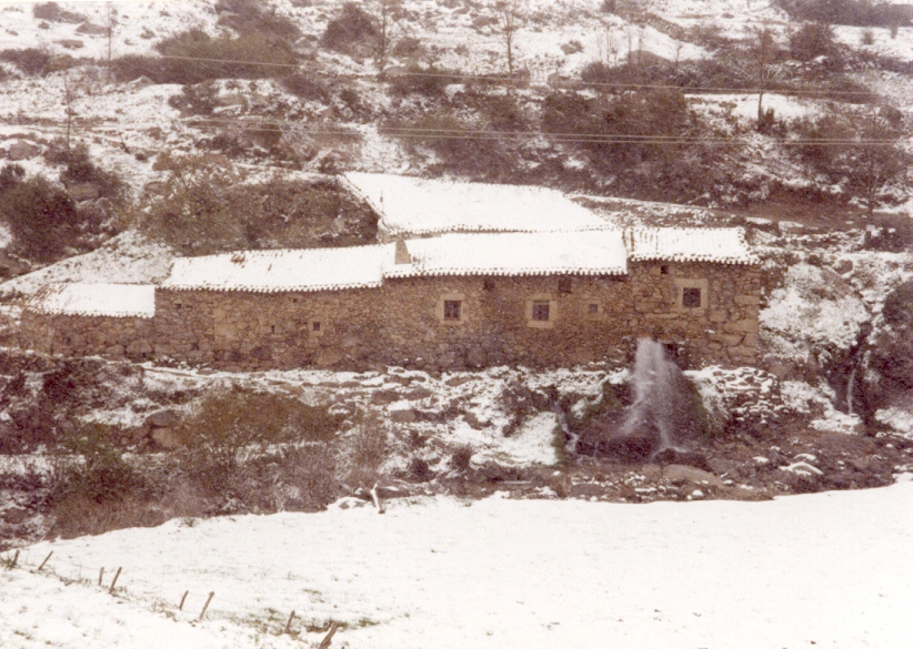 Molino de Tío Alberto (tomada en la Semana Santa de 1998). Villafranca de la Sierra (Ávila, España). Autor: C3PO